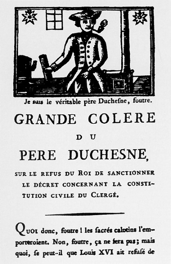 Le père Duchesne, n. 13, novembre 1790